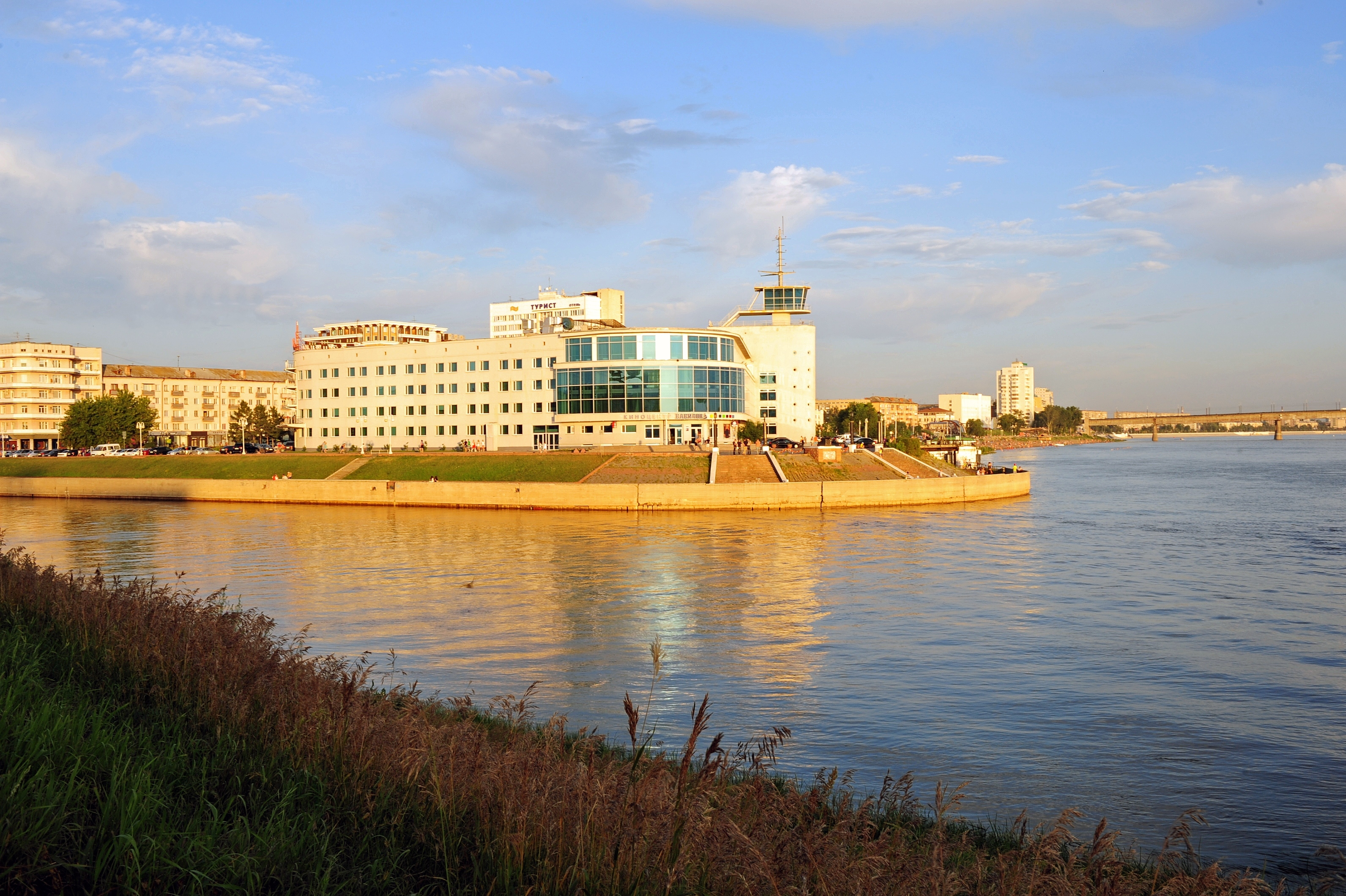 Здание речного вокзала: площадь Бухгольца, Омск, Омская область